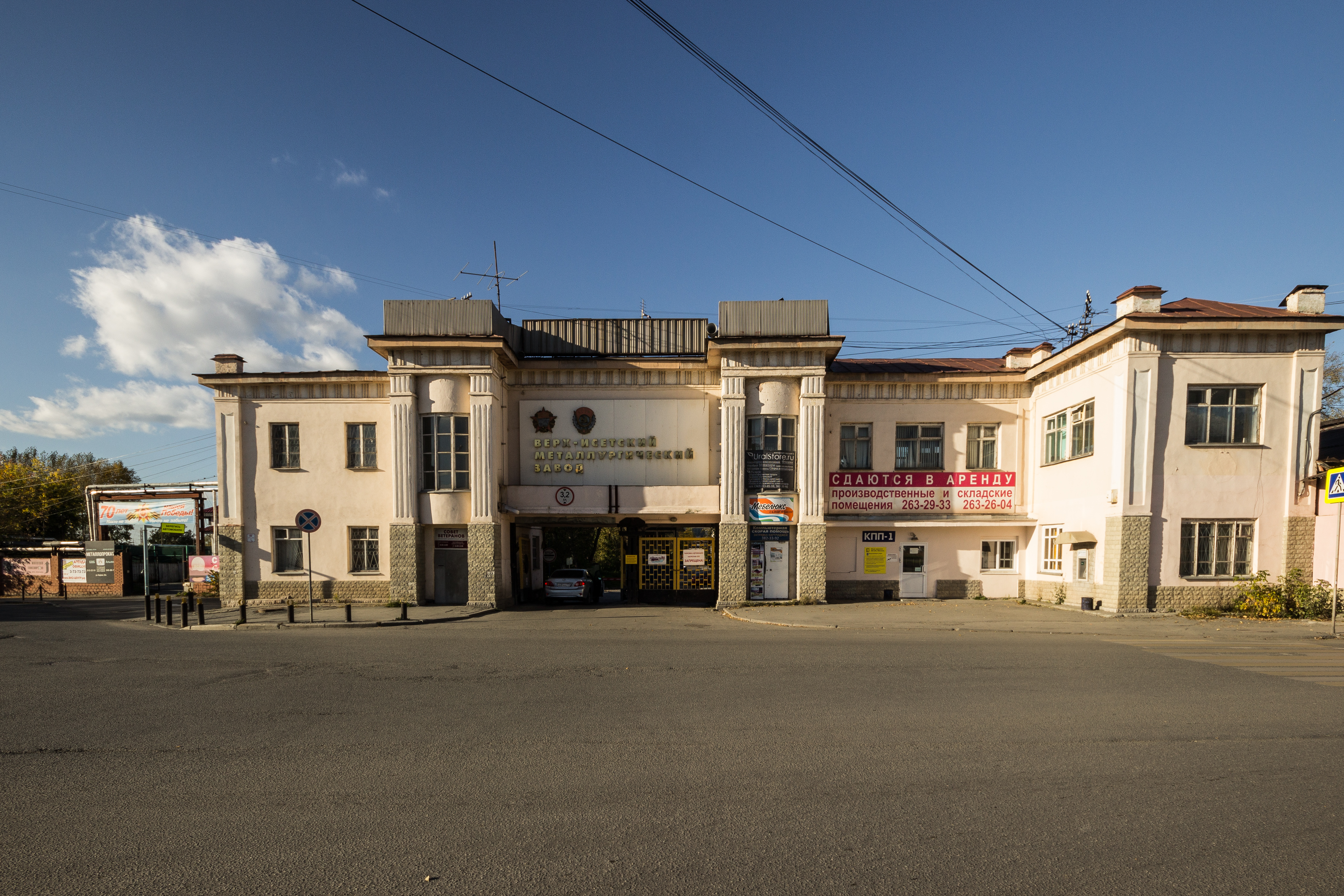 Завод Верх-Исетский: улица Кирова, 28, Екатеринбург, Свердловская область